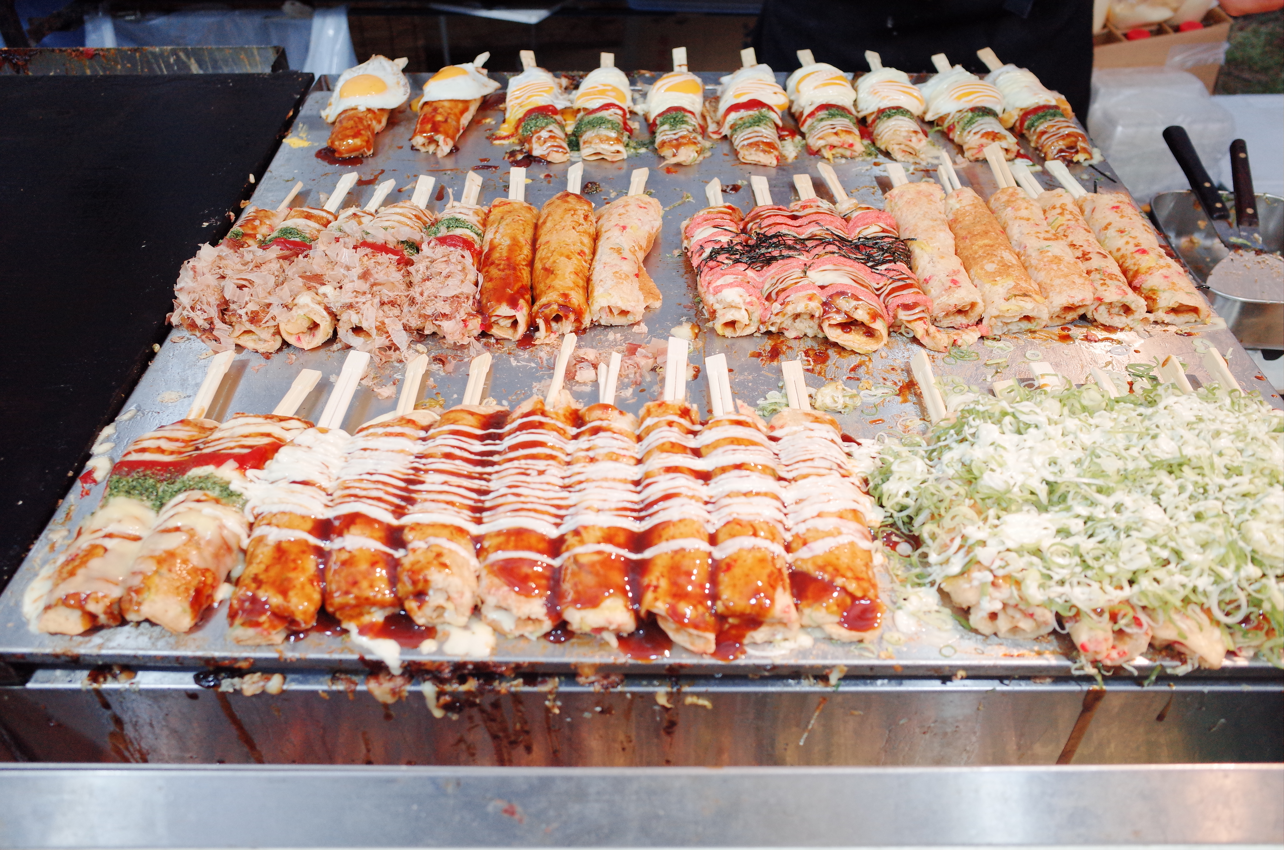 OSAKA